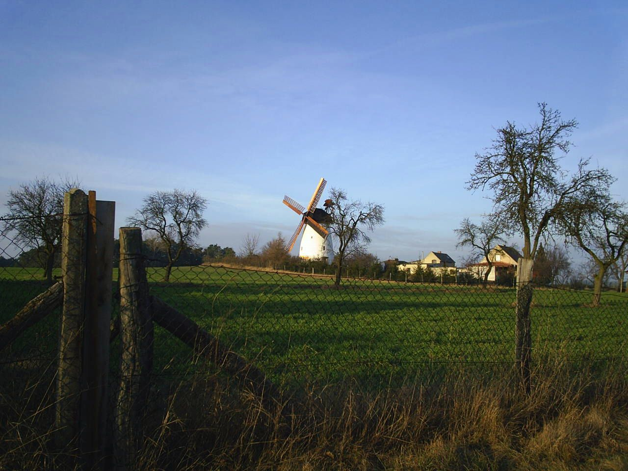 Holländer-Windmühle und Streuobstwiese bei Haseloff östlich Niemegk.